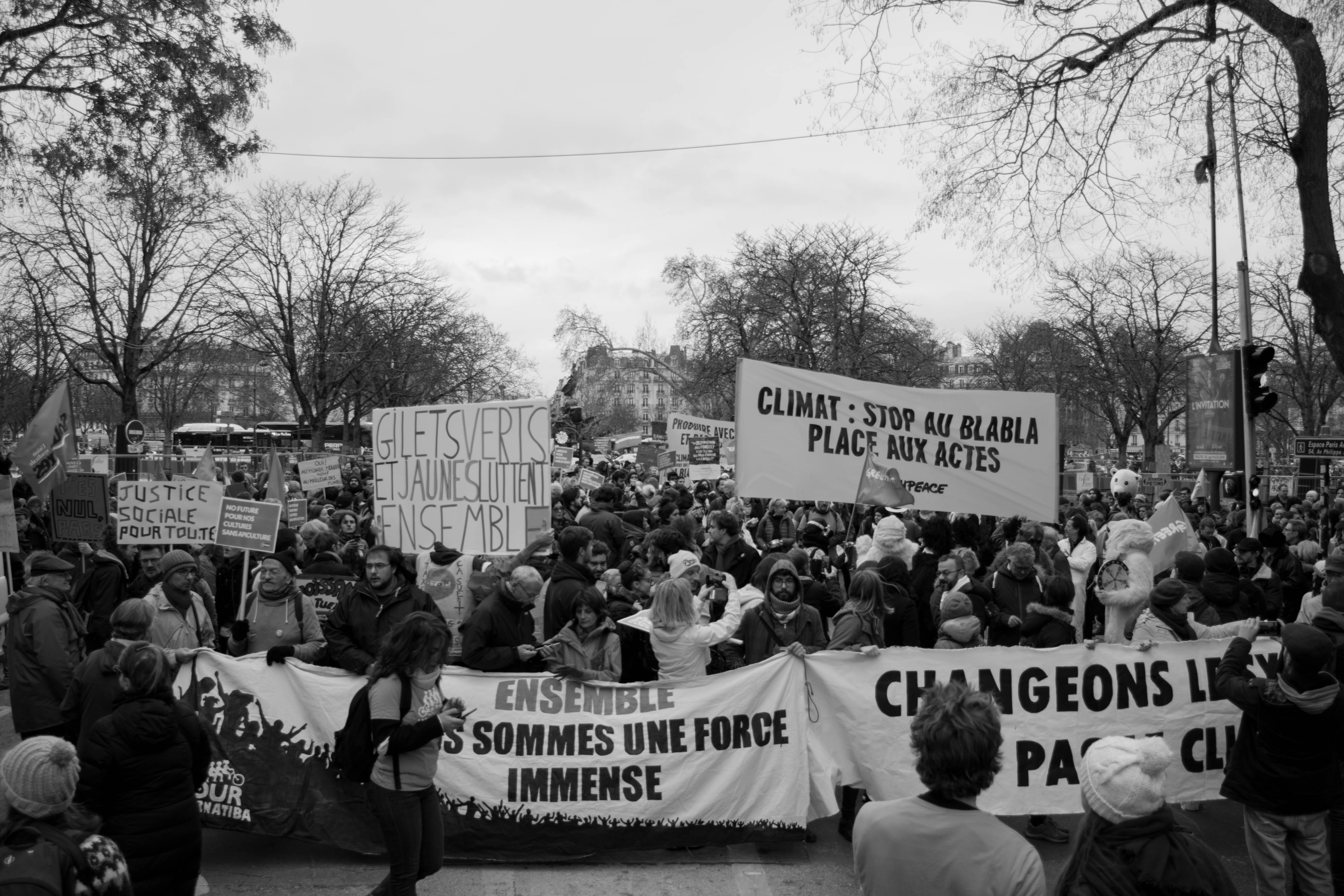 Marche pour le climat du samedi 8 décembre 2018, à Paris (France).